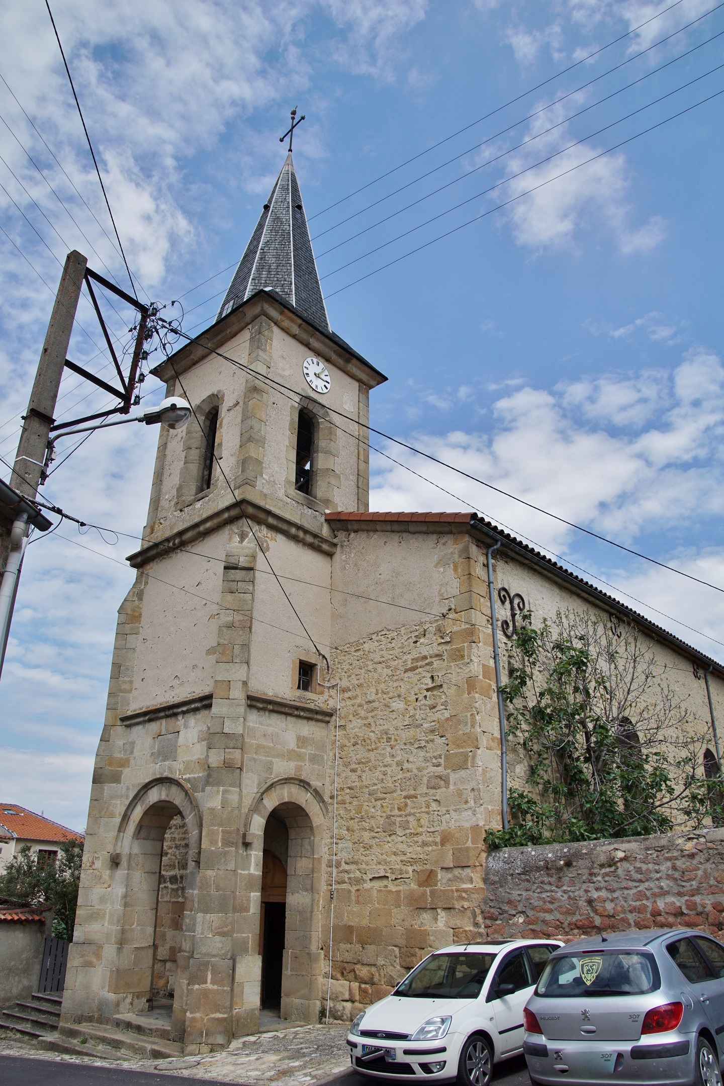 Puy de Dôme